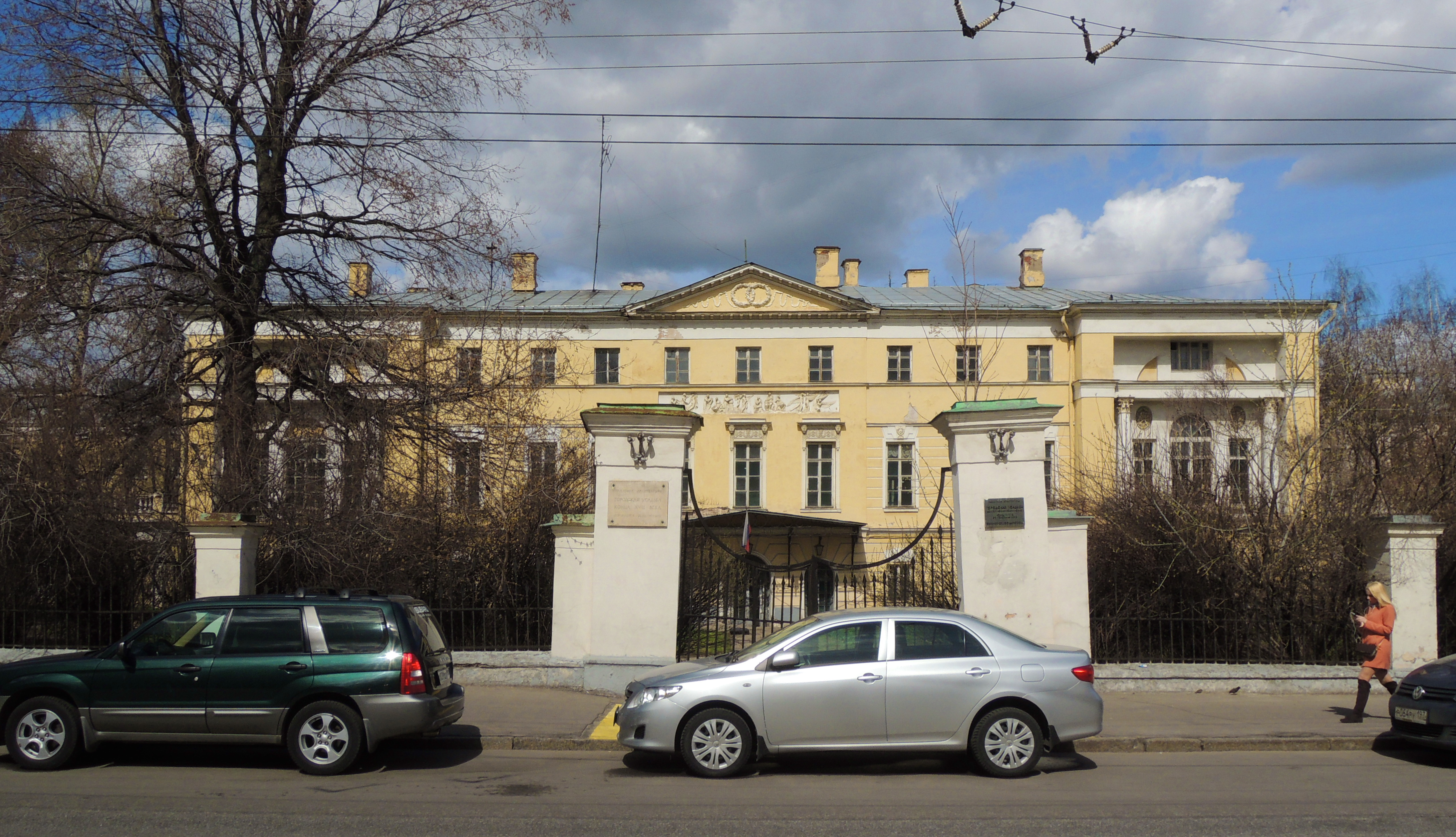 Малая Никитская улица. № 12 — Усадьба Долгоруких-Бобринских. Дом Ростовых в «Войне и мире» С. Бондарчука. Считается прототипом дома, во флигеле которого с 1883 по 1891 жил Эраст Петрович Фандорин, герой серии романов Бориса Акунина